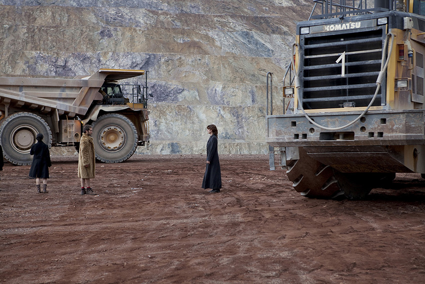 GANGART-2012 Foto: Lawine Torren / Magdalena Lepka